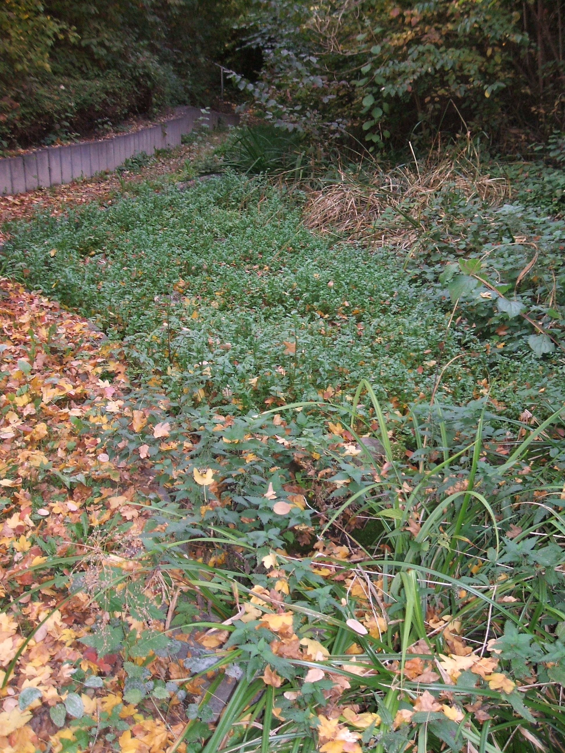 In einem flachen zweiten, tiefer gelegenen Becken des Pfingstbrunnens, einem kleinen Naherholungsgebiet im Industriegebiet Süd von Friedberg_(Hessen), gelegen zwischen Miele und Subaru, wächst beinahe eine Monokultur des Knotenblütigen Selleries. Die Pflanzen wiesen Mitte Oktober 2018 eine nahezu gleiche Wuchshöhe auf, was eventuell auf städtische "Pflegemaßnahmen" hinweist. Die Pflanzengemeinschaft ist so zahlreich und durch hohe Büsche sowie Bäume windgeschützt, dass ein merklicher Selleriegeruch die Besucherinnen empfängt.